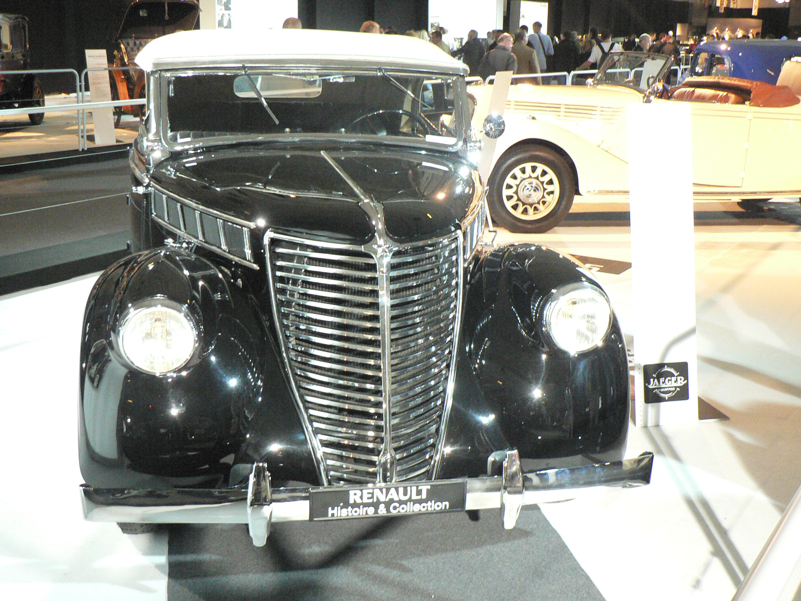 Mondial de l automobile de Paris (October 2006)